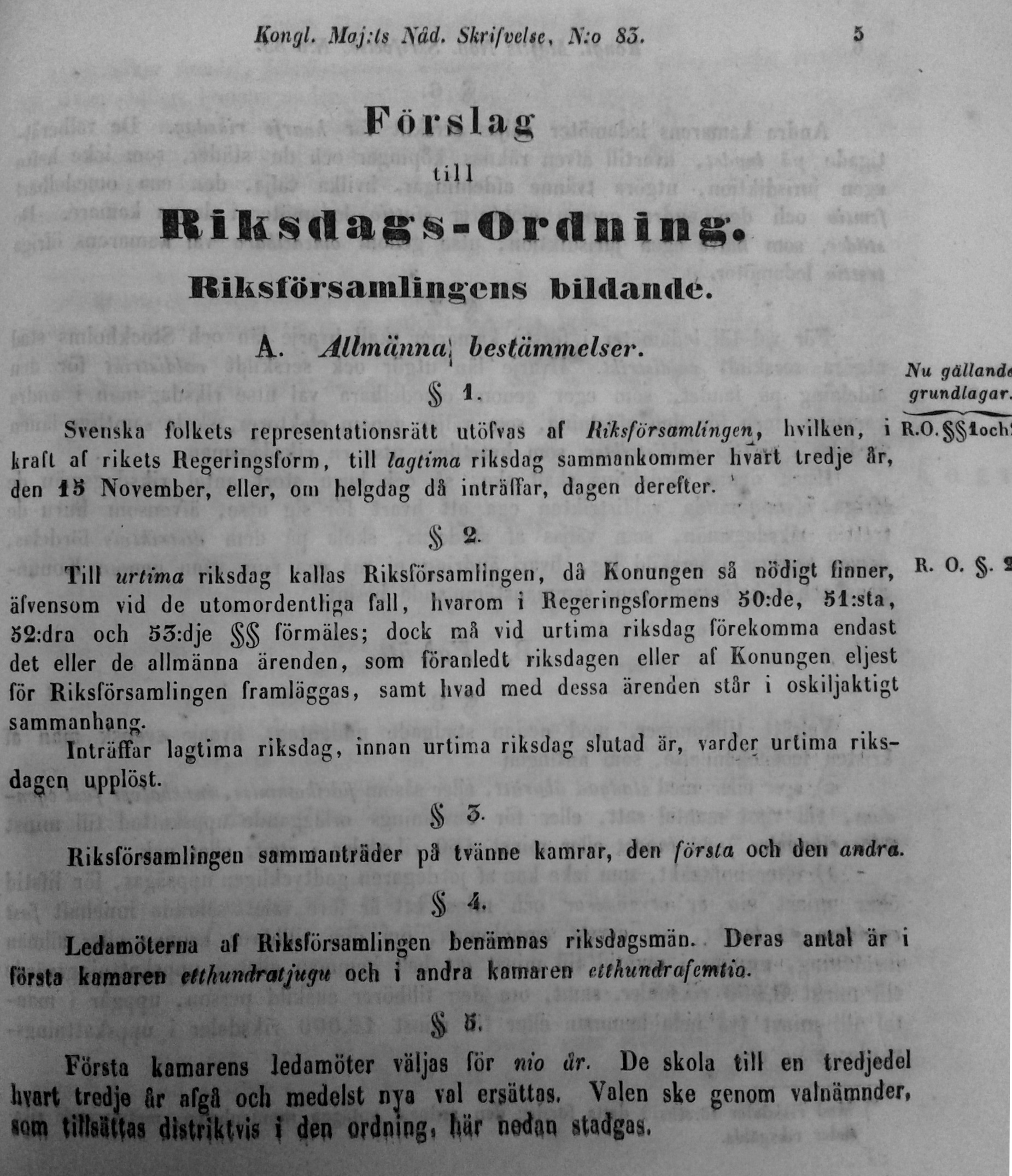 Första sidan av Louis de Geers, Arendt Dreijers och Edvard Carlesons slutgiltiga representationsförslag från år 1862.